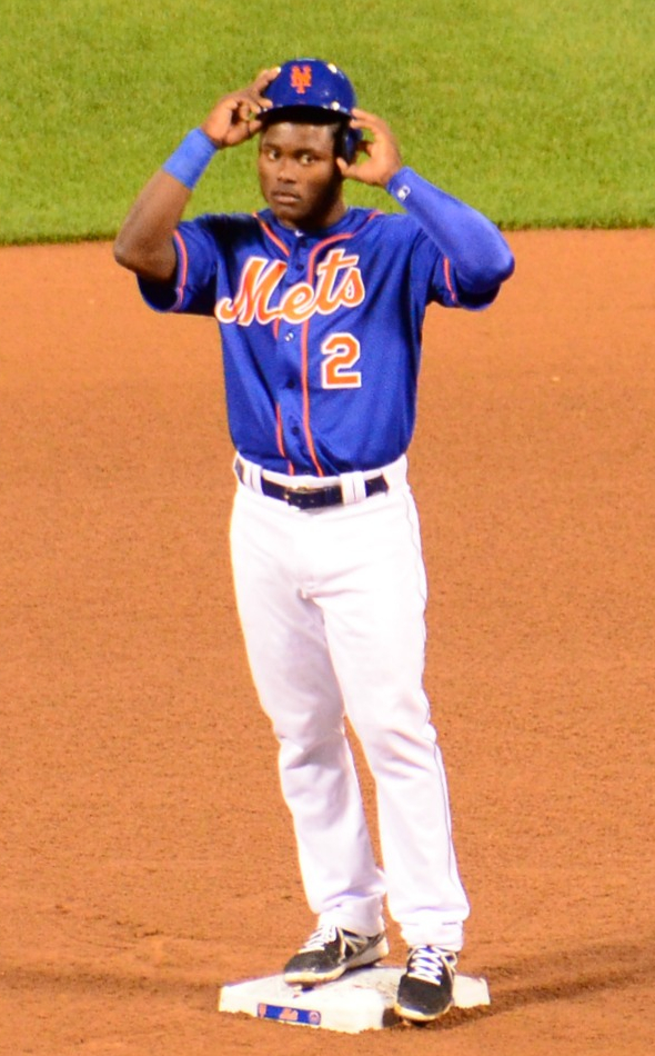 Dilson Herrera